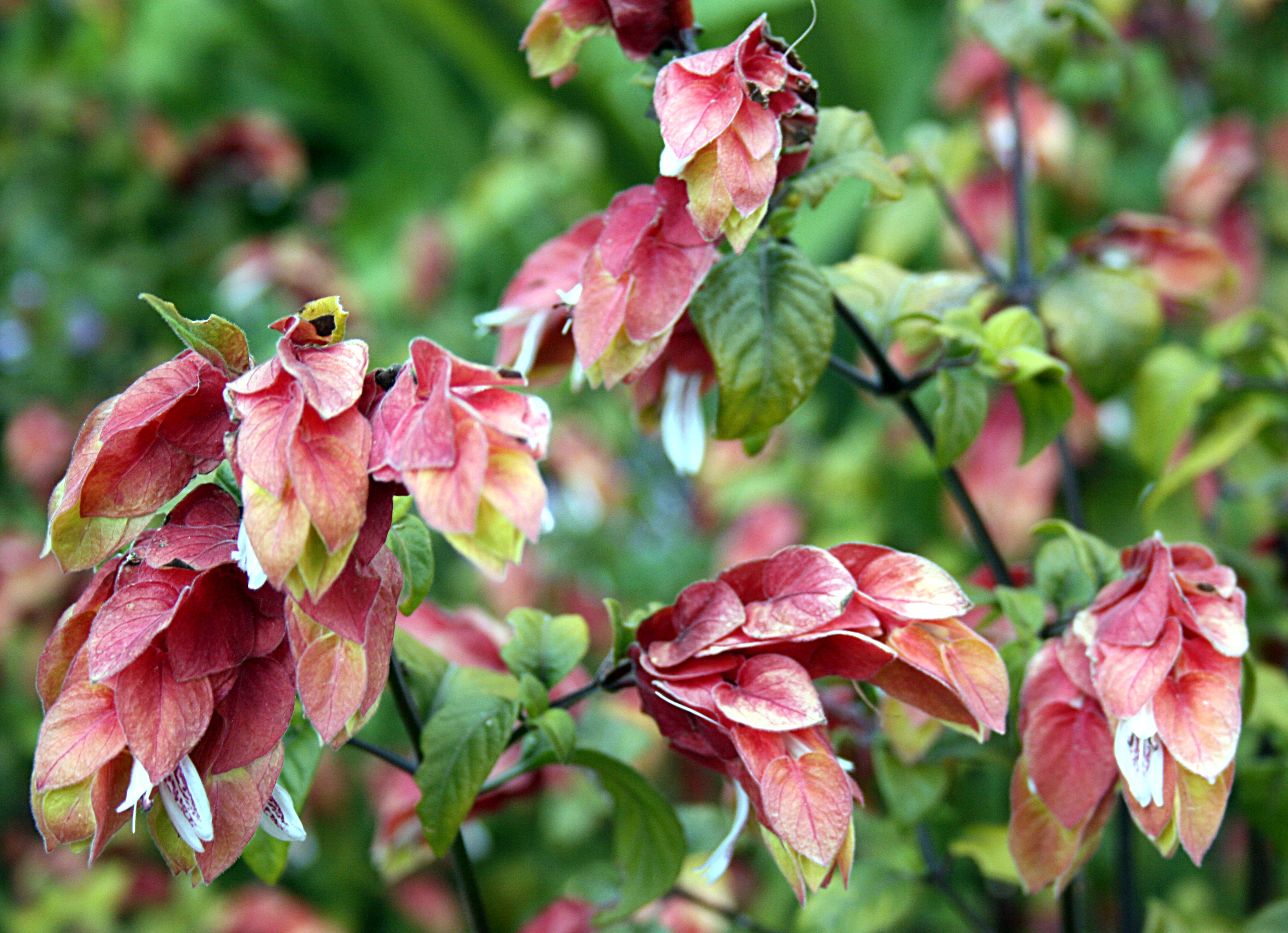 Madeira,_Palheiro_Gardens_-_Justicia_brandegeeana